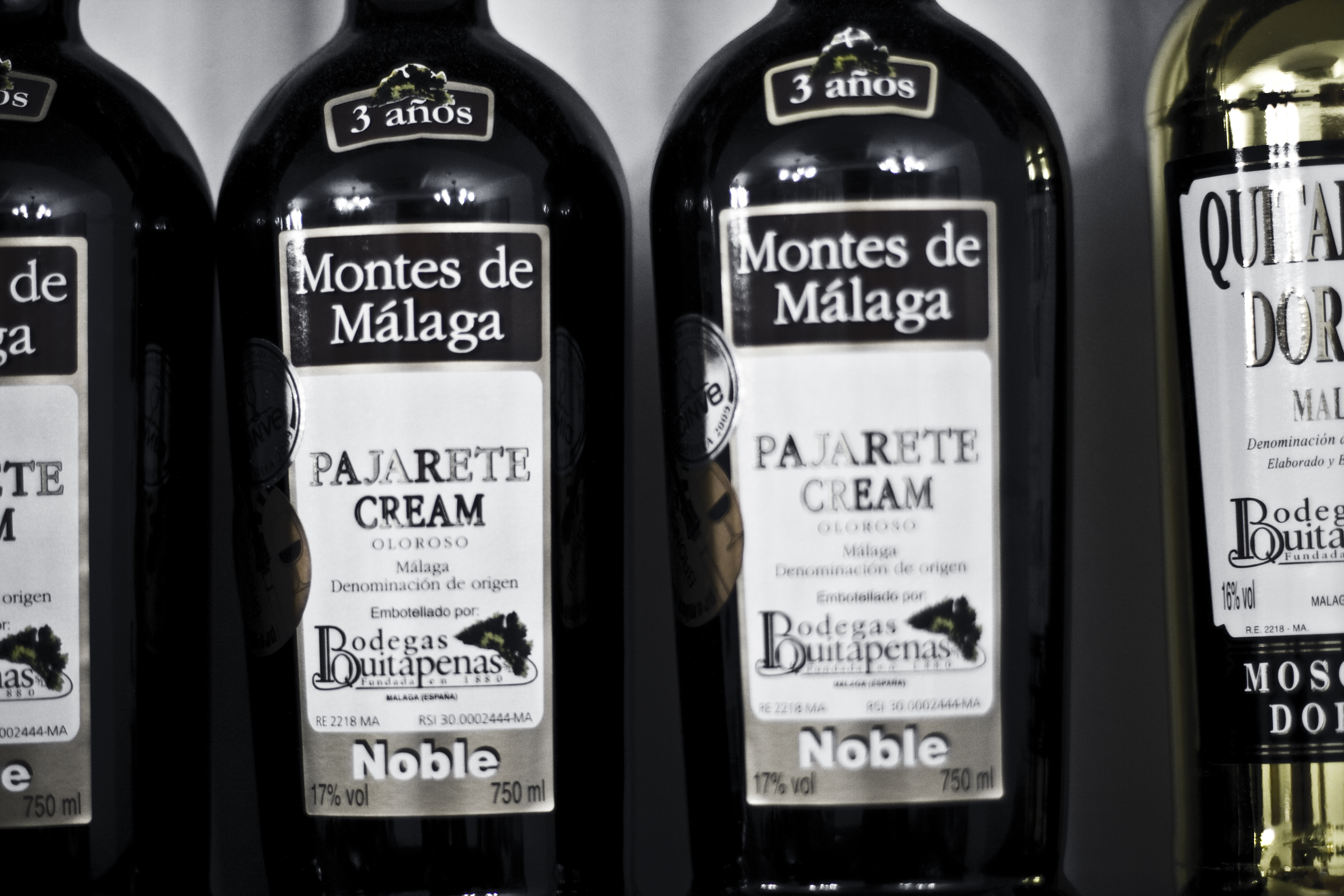 Málaga noble wine